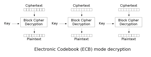 Esquema del descifrado ECB